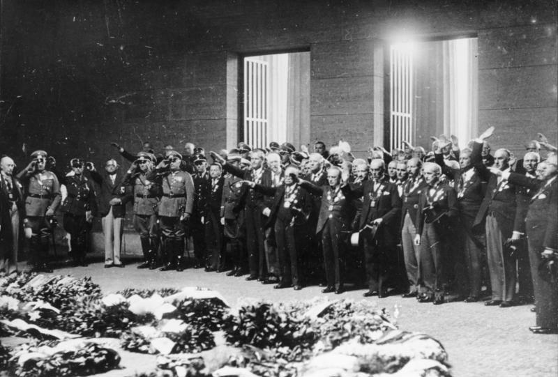 Berlin, Ehrenmal Neue Wache, IOC-Mitglieder ADN-ZB/Archiv Faschistisches Deutschland 1933-1945 Olympische Sommerspiele 1936 in Berlin: Die Mitglieder des Internationalen Olympischen Komitees im Ehrenmal in der Strasse Unter den Linden (Aufn.: 1. August) Scherl Bilderdienst